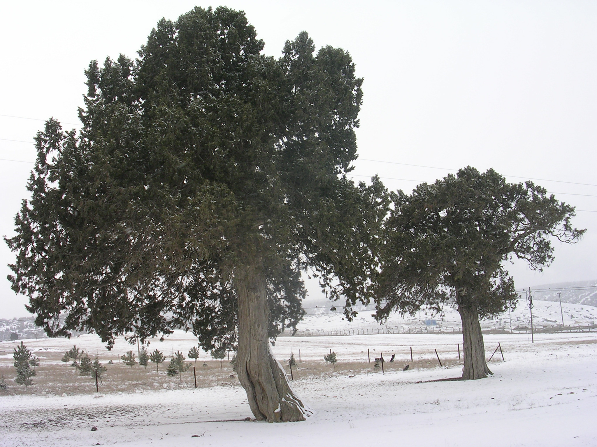 Oklubalı Köyü, İnönü anıt agaçları; Boylu ardıç (Juniperus excelsa)